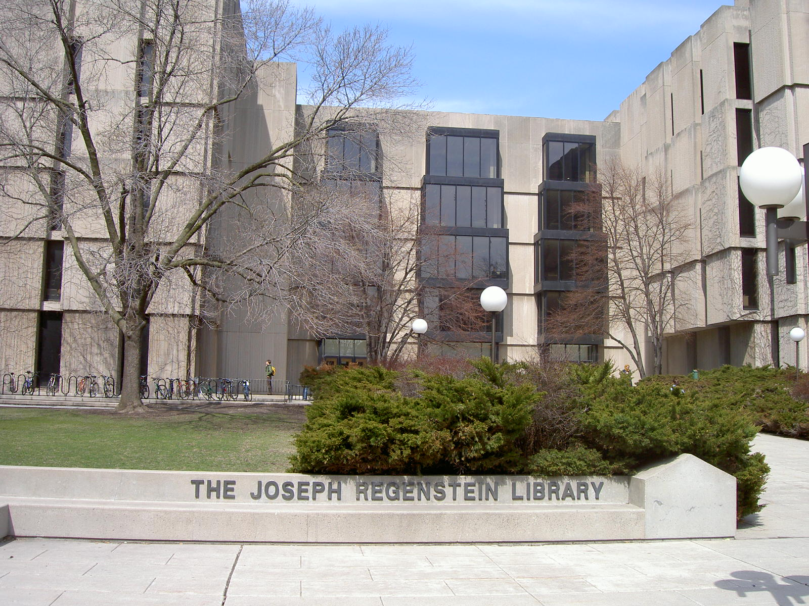 Reg